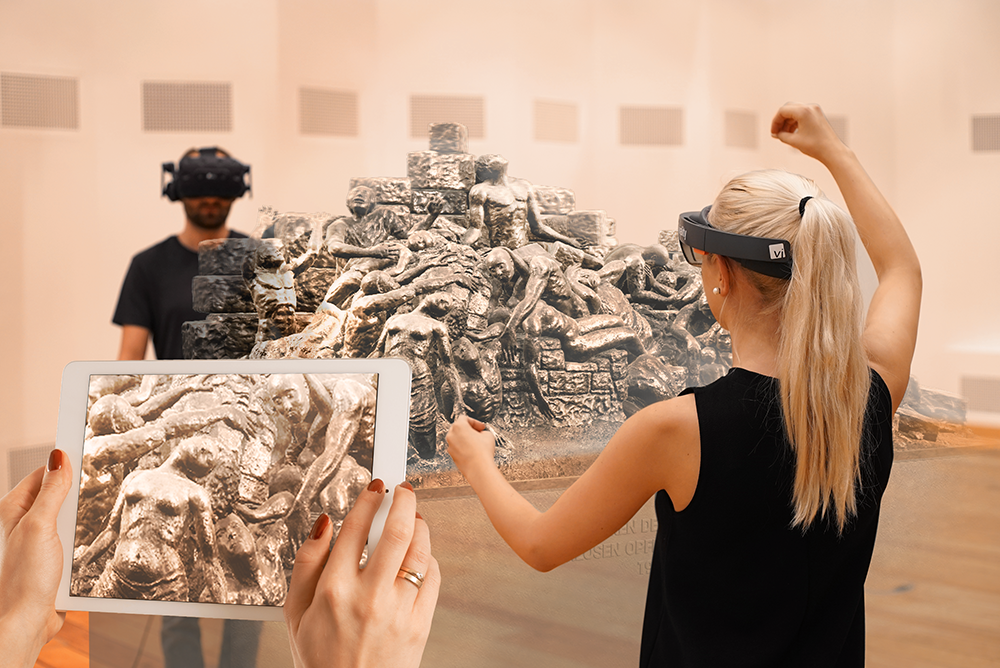 Photogrammetrische Nachbildung des "Mahnmals für die Opfer des Krieges" des Dortmunder Künstlers Benno Elkan